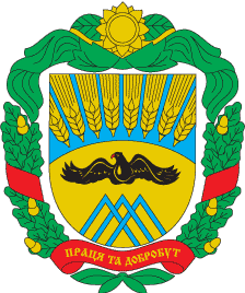 Герб Устинівського району